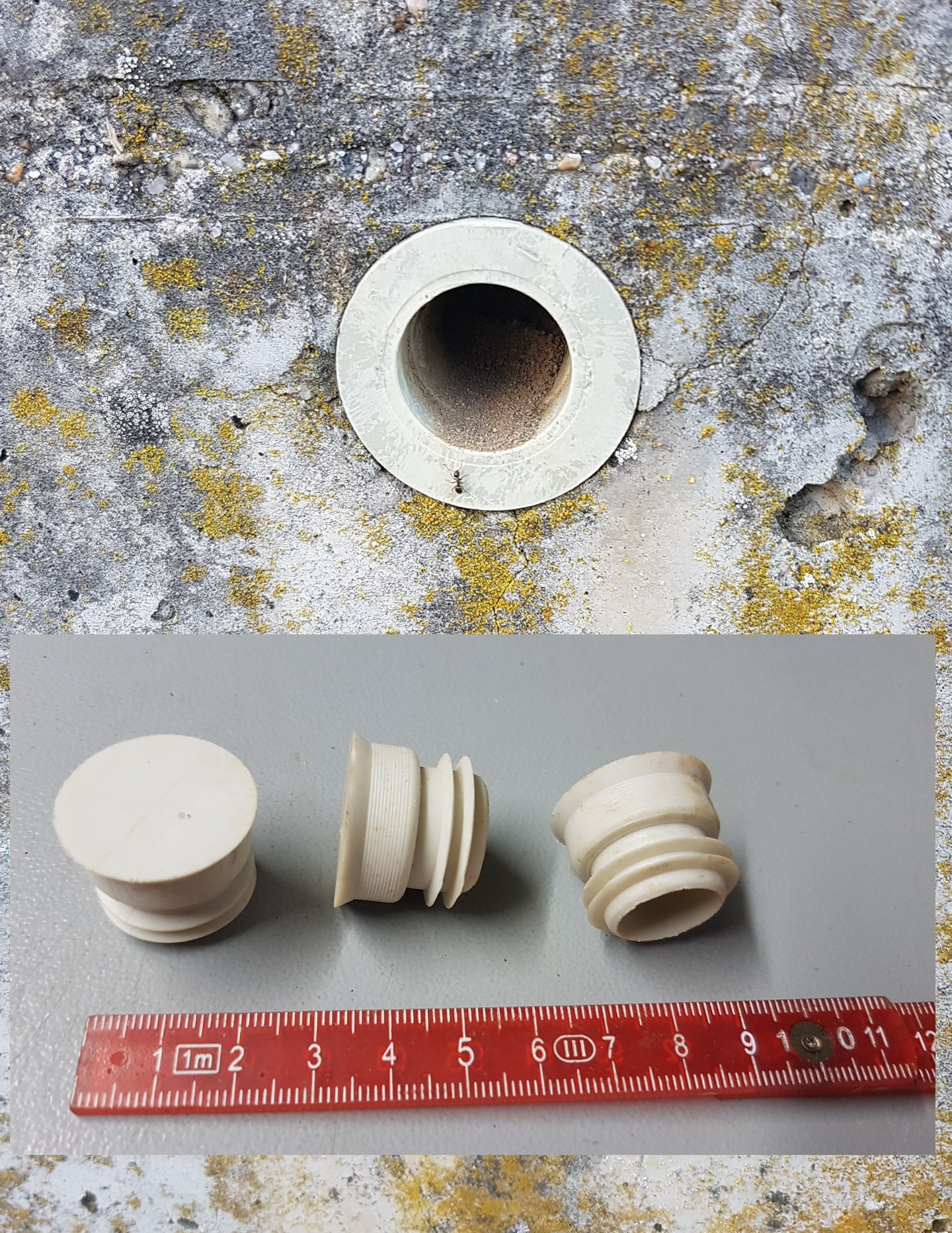 Offenes Schalungsloch mit Hüllrohr in einer Mauerverschalung. Detailbild des Verschlußstopfens (in 3 Seitenansichten), welcher in diesem abgebildeten Schalungsloch fehlt.